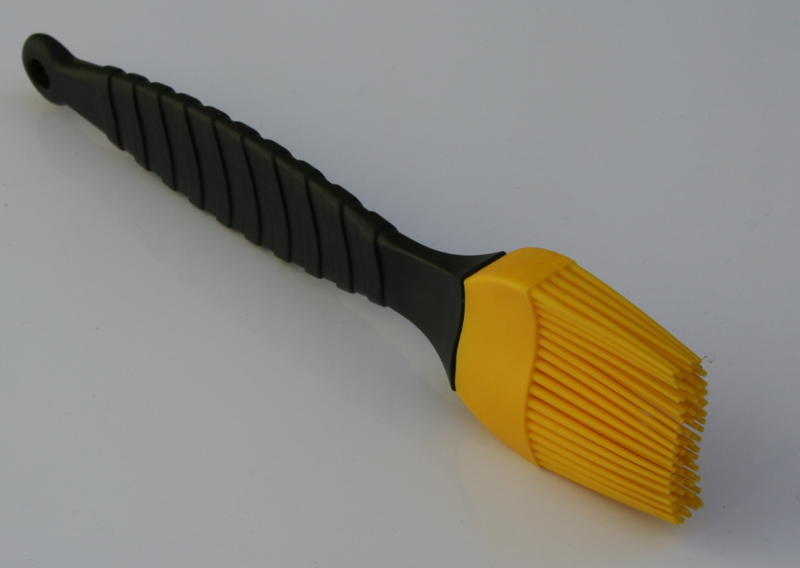 Silikonpinsel